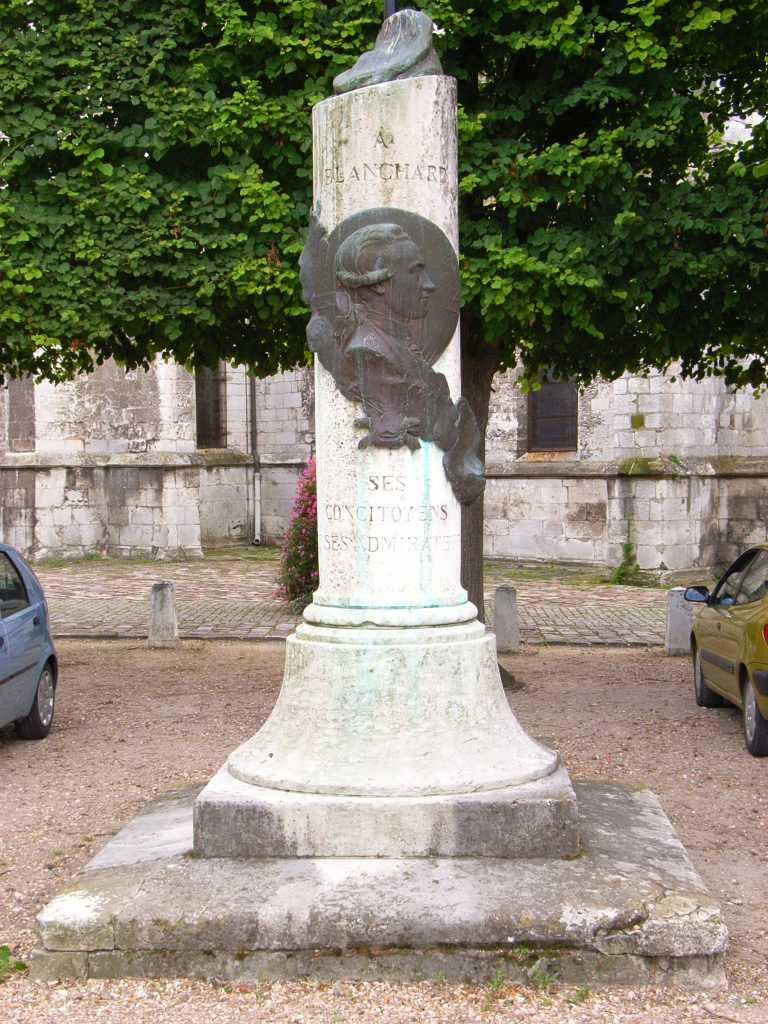 Gedenksäule für den Flugpionier und Ballonfahrer Blanchard, Le Petit Andely, Eure, France